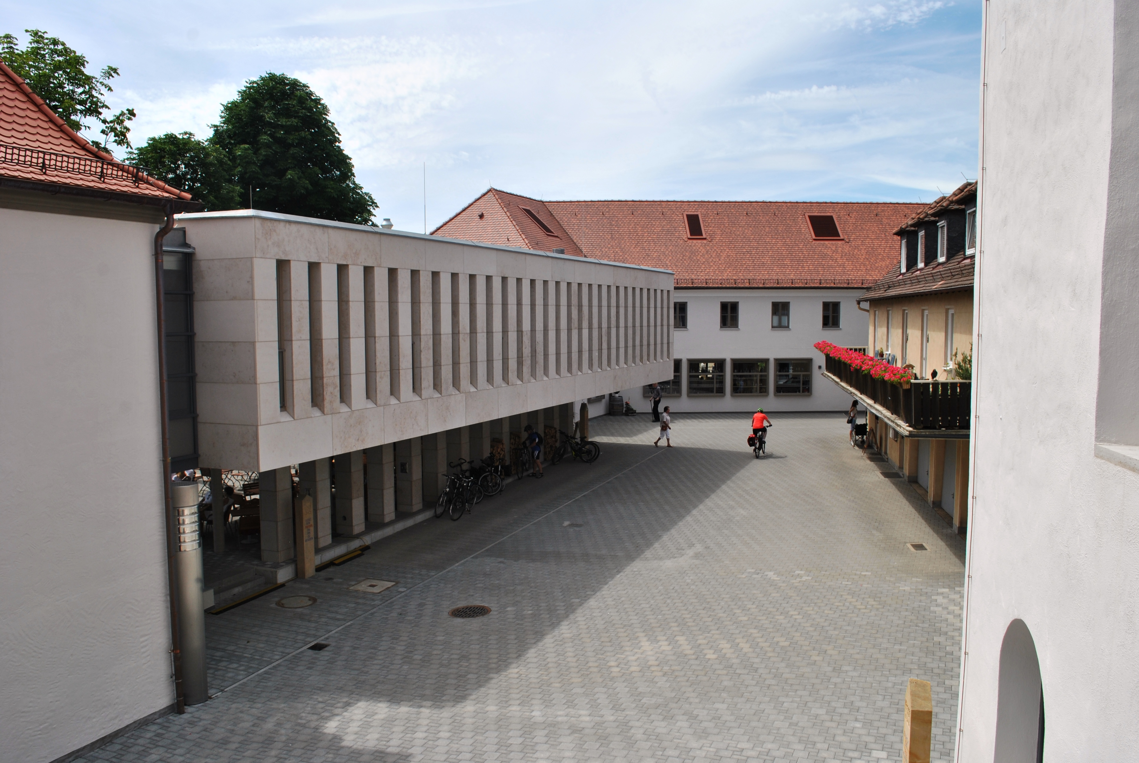 Kloster Vogelsburg, Verbindungsbau 2015